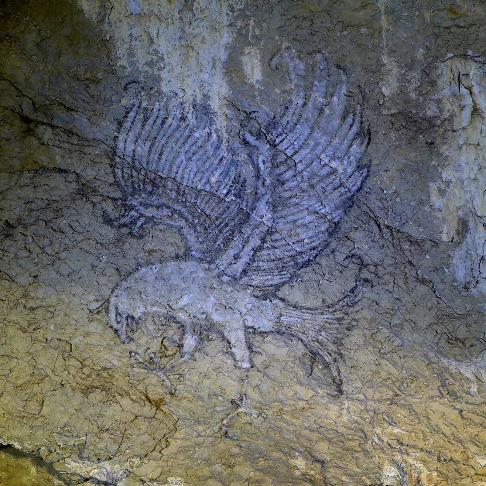 Grafik "Weisser Falke" in der Oswaldhöhle